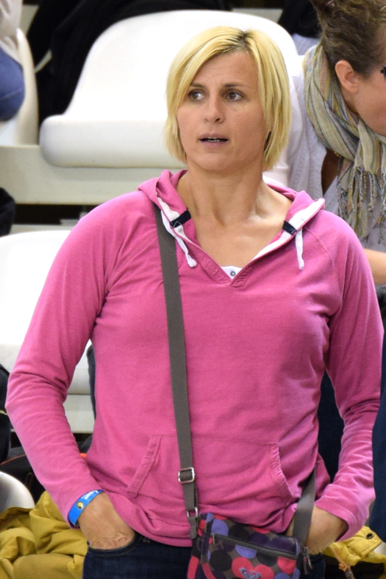 Krisztina Pigniczki , lors de la rencontre de la 10e journée en Issy Paris Hand et Metz Handball, le 12 noembre 2014. Au stade Robert Carpentier à Issy les moulineaux.